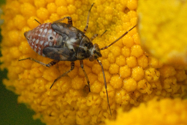 Lygus pratensis from Commanster, Belgian High Ardennes .